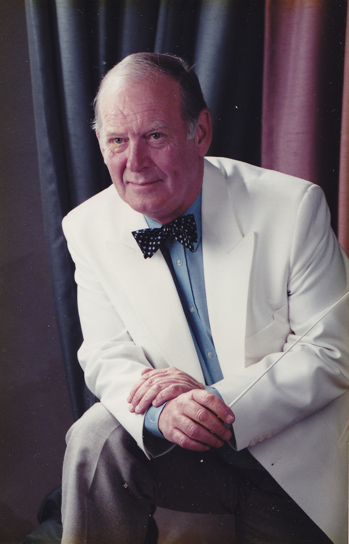 Gerard van der Weerd